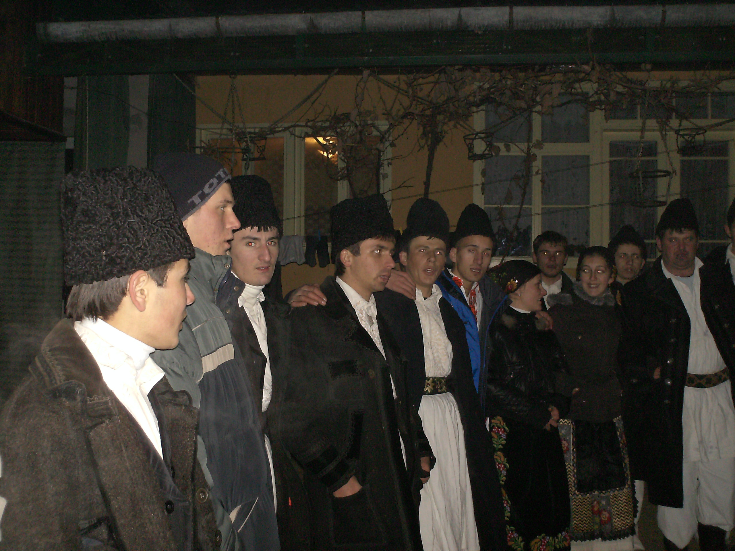 Poză făcută in seara de ajun, atunci când se colindă prin sat, dar se merge si la cimitir. La colindat participă foarte mult tineret imbrăcat in haine populare. Plecarea este pe la ora 22:00 si durează până pe la ora 02:00 noaptea. După aceea lăsându-se cu chef si voie bună (jocuri populare), așa cum petrece almajanul.